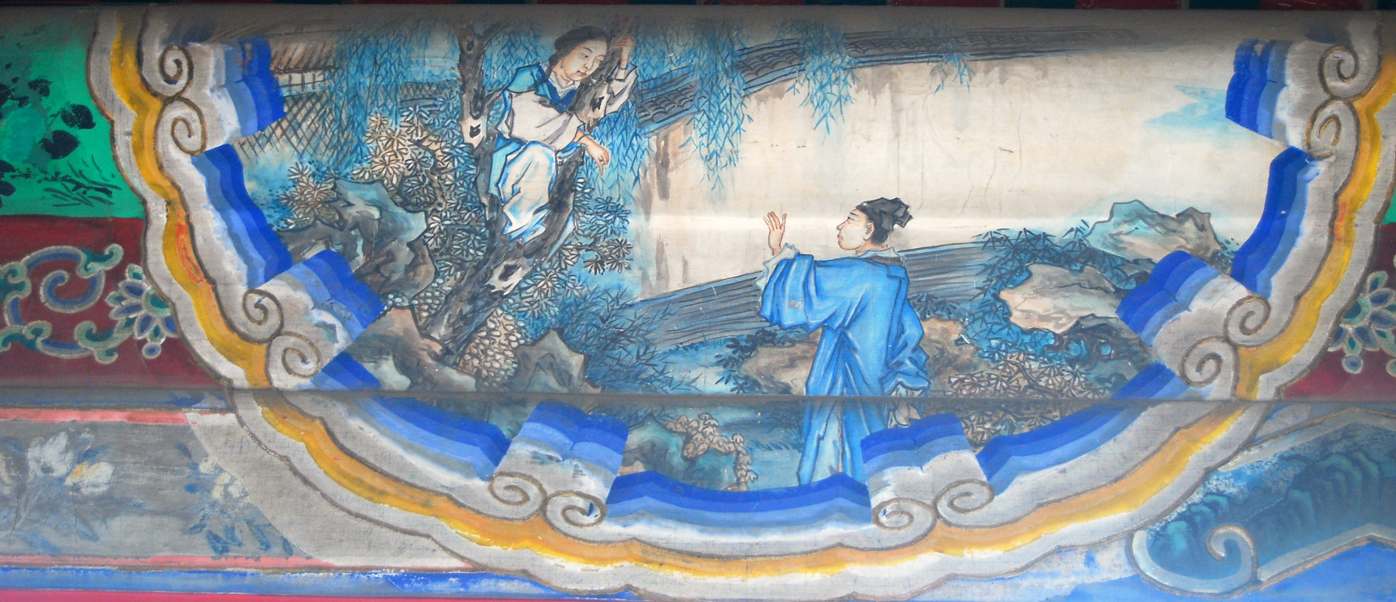 颐和园长廊上的彩绘：婴宁